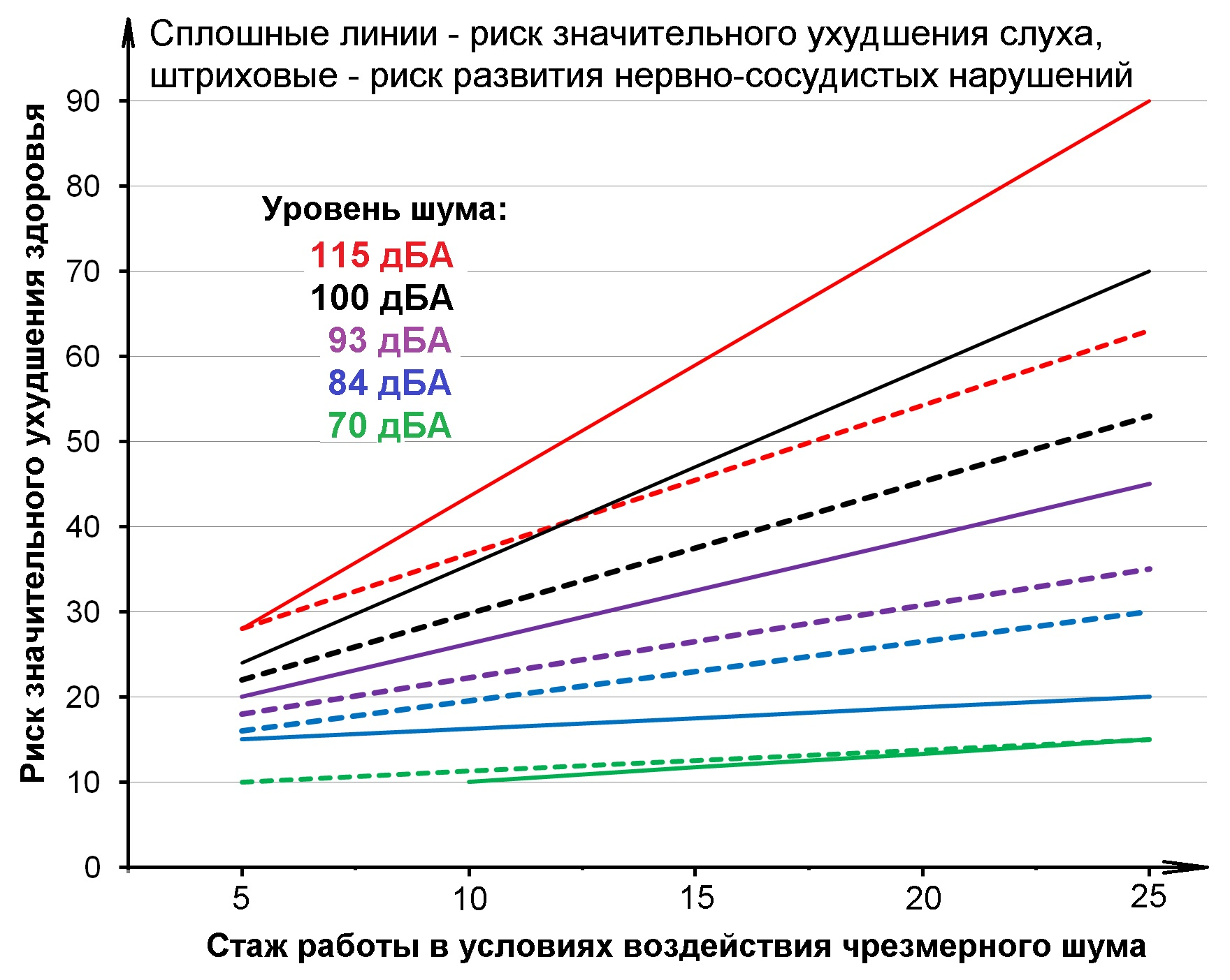 Сравнение риска значительного ухудшения слуха и риска развития нервно-сосудистых нарушений при воздействии промышленного шума разной громкости и разном стаже работы. Использованы данные из: Измеров НФ, Суворов ГА, Прокопенко ЛВ Человек и шум. М. ГЭОТАР-МЕД, 2001 ISBN 5-9231-0057-6, стр 139-140